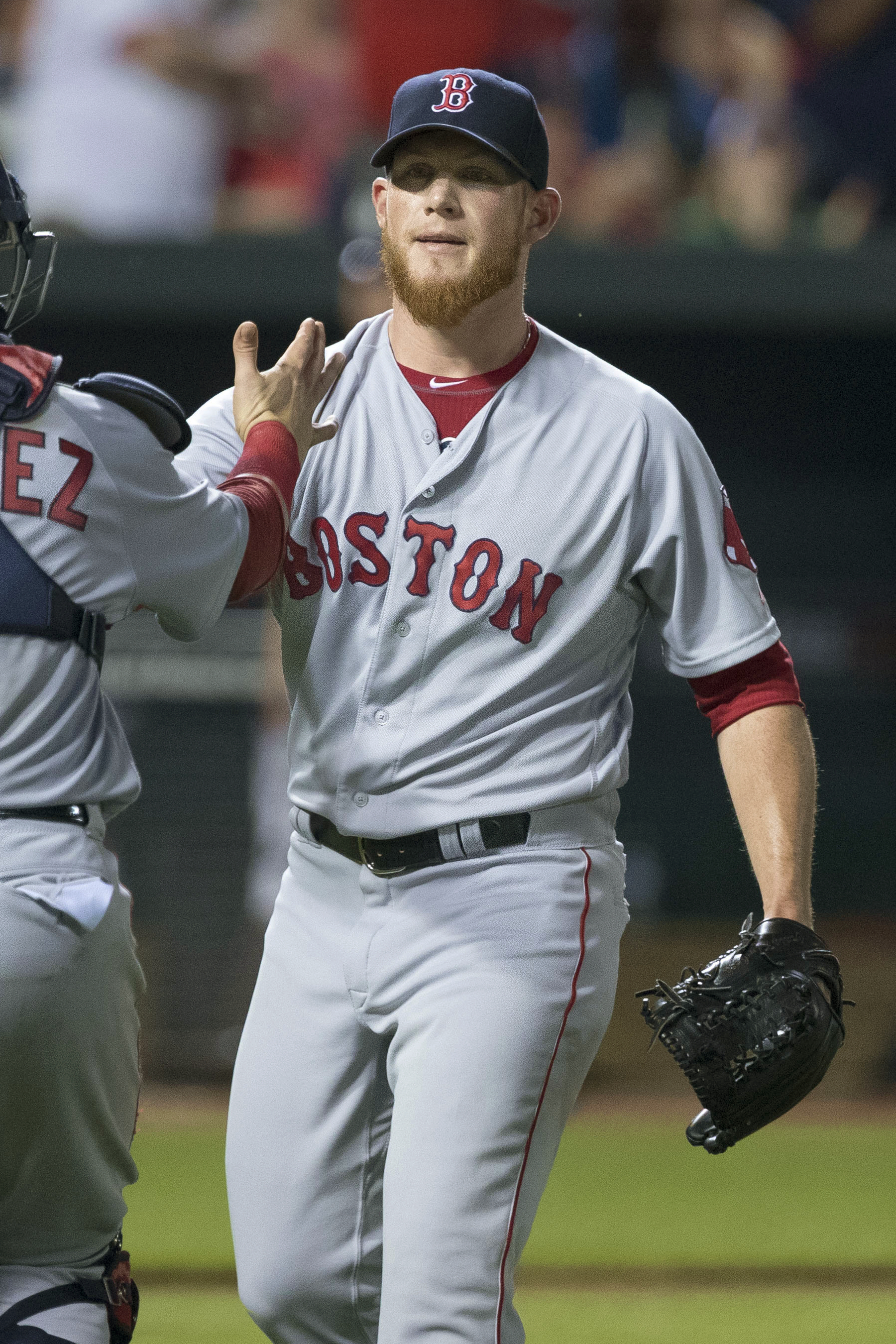 Craig Kimbrel